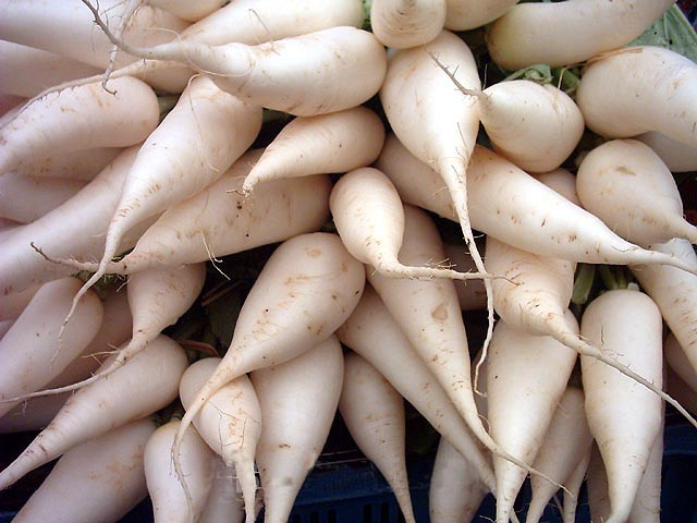 Rettich - Raphanus sativus - Marktware